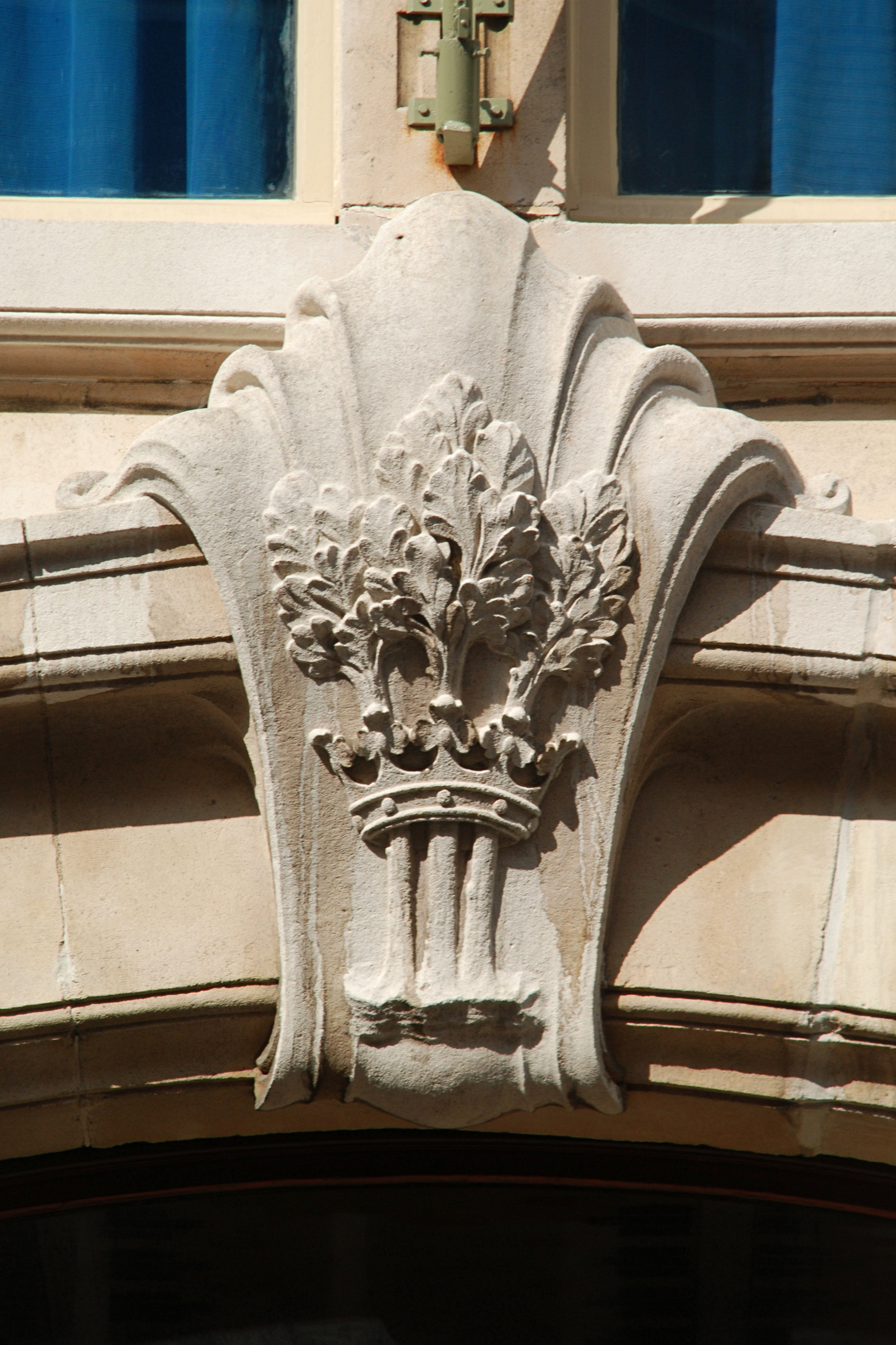 Belgique - Bruxelles - École Rodenbach (Art nouveau - architecte Henri Jacobs - 1905-1911)